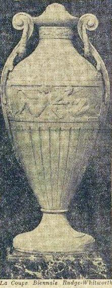 La Coupe biennale Rudge-Whitworth aux 24 Heures du Mans, en 1926.